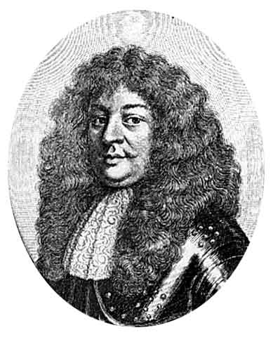 Portrait (Stich) von Friedrich von Hessen-Homburg um 1670